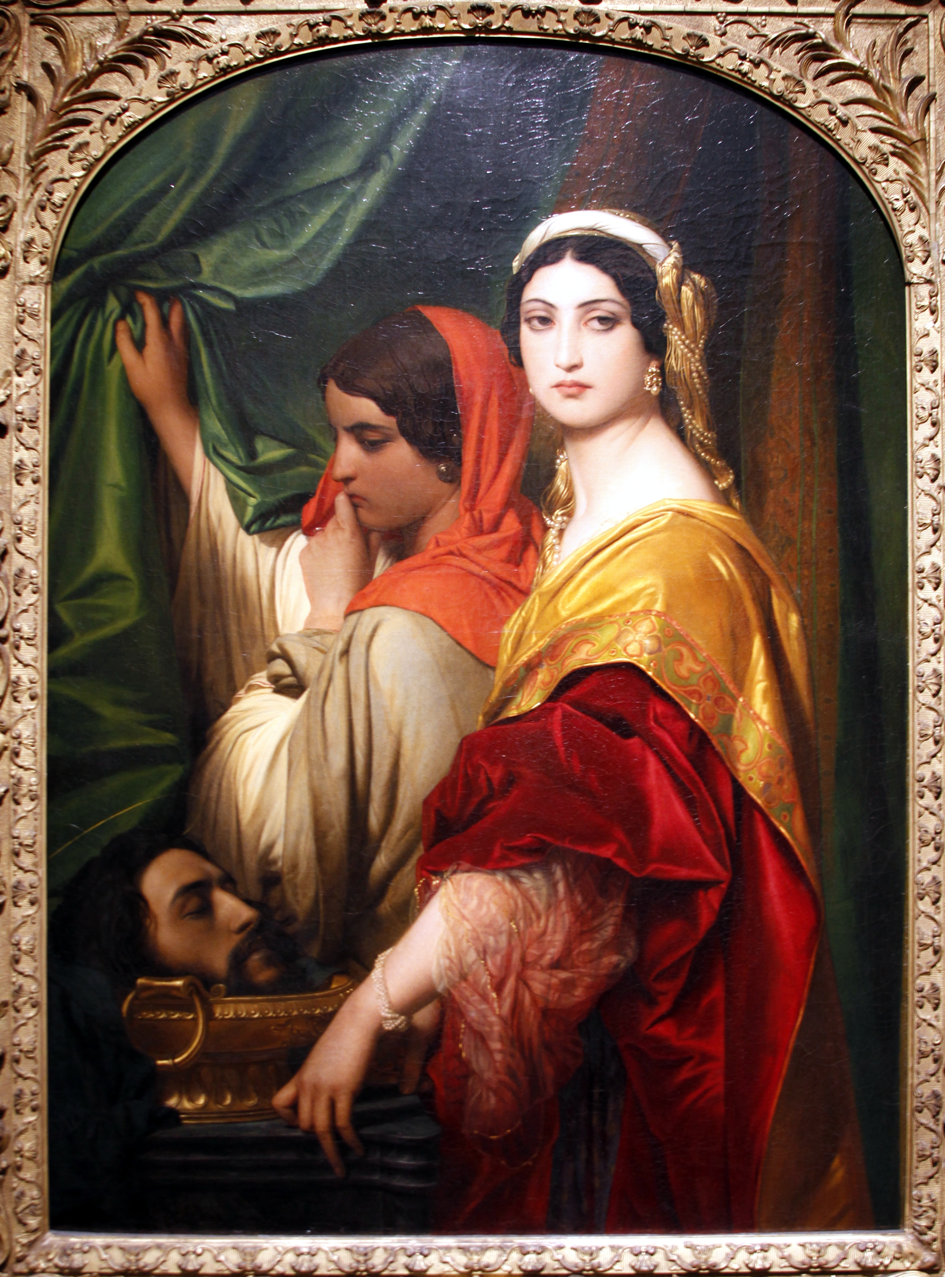 Wallraf-Richartz Museum - Cologne